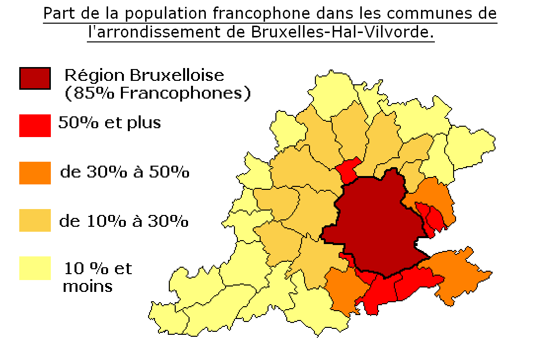 Part de la population francophone dans les communes de l’arrondissement de Bruxelles-Hal-Vilvorde. Nous présumons que toute personne ne parlant pas le néerlandais, est automatiquement francophone. Les immigrés sont donc tous francophones (Italiens, Marocains, Turcs, Anglais…).